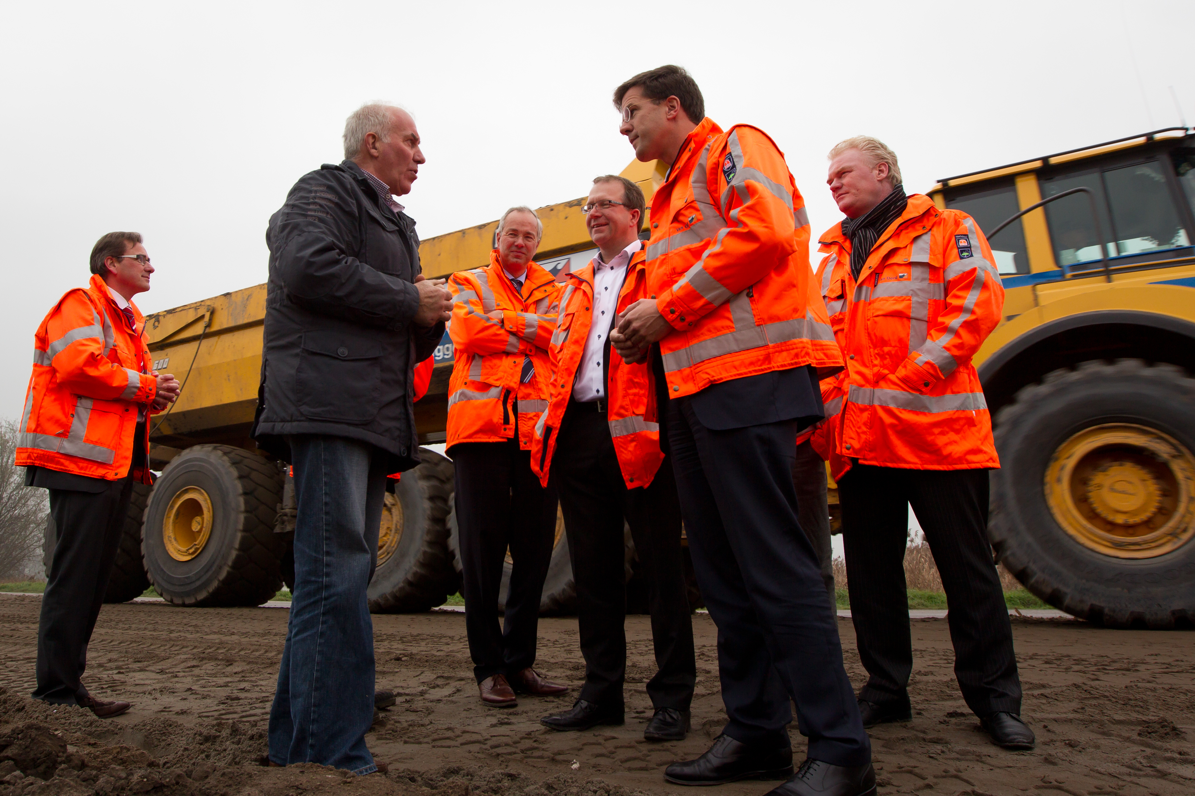 Minister-president Rutte in gesprek met één van de bedenkers van het terpenplan voor de Overdiepse Polder. Daar wordt hard gewerkt om ruimte voor de rivier te maken. Om de polder geschikt te houden voor landbouw, hebben de inwoners en ondernemers zelf het ingenieuze terpenplan bedacht. Bestaande boerderijen en agrarische bedrijfsgebouwen worden gesloopt en op acht terpen bouwen boeren een nieuw bedrijf met groeipotentie. Een duizenden jaren oud idee, maar dan high tech uitgevoerd. De Nederlandse deskundigheid op dit gebied vormt al decennia een krachtig exportproduct. Zo is dit project inmiddels al door meer dan 90 buitenlandse organisaties bezocht. Bezoekers van Azerbeidzjan tot Vietnam. Lees hier meer over het project Overdiepse polder